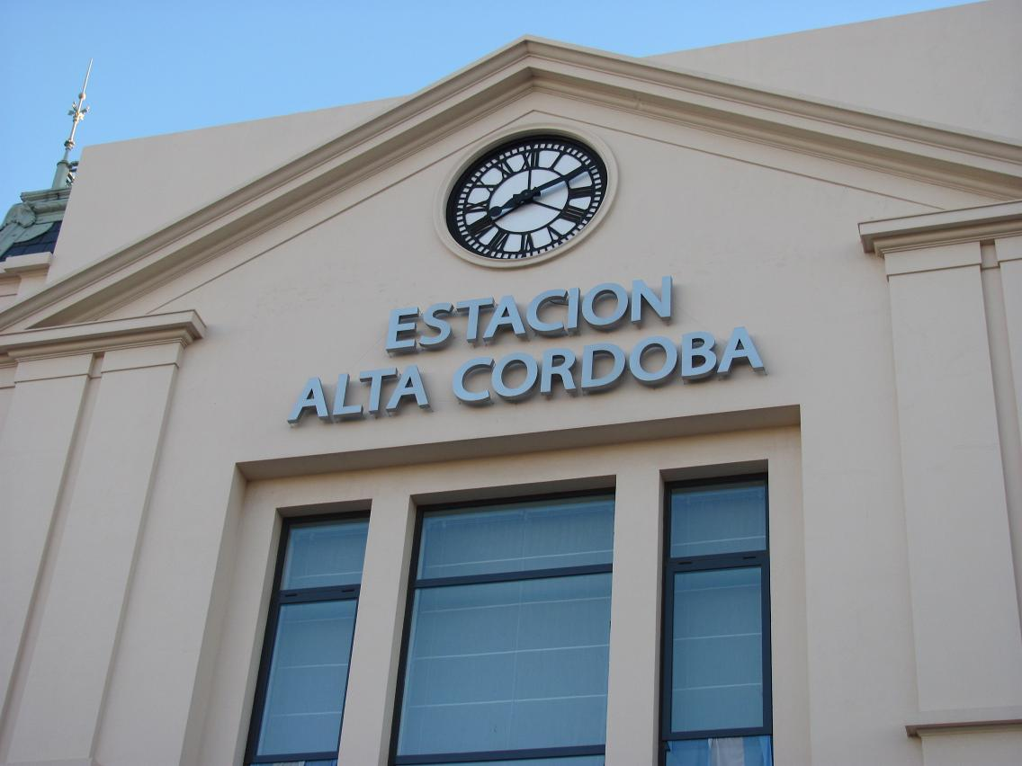 Estación Alta Córdoba, Argentina.